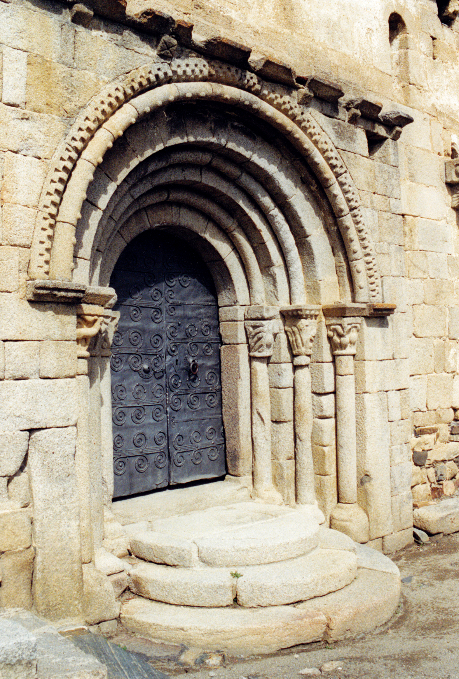 Espagne - Basse-Cerdagne - Église Saint-Estève de Guils de Cerdanya